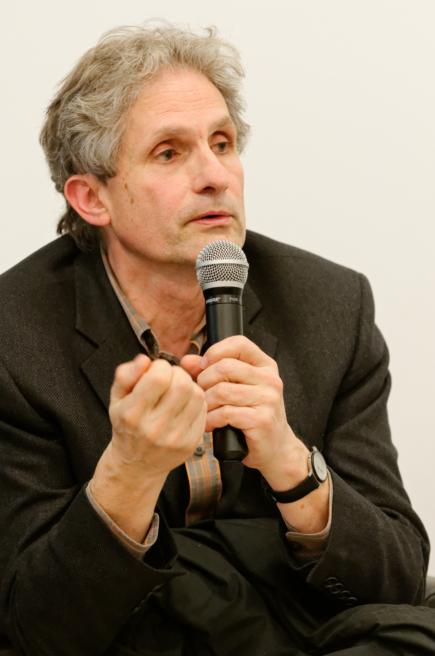 Philippe Aigrain lors de la Journée du domaine public 2012 à Paris.